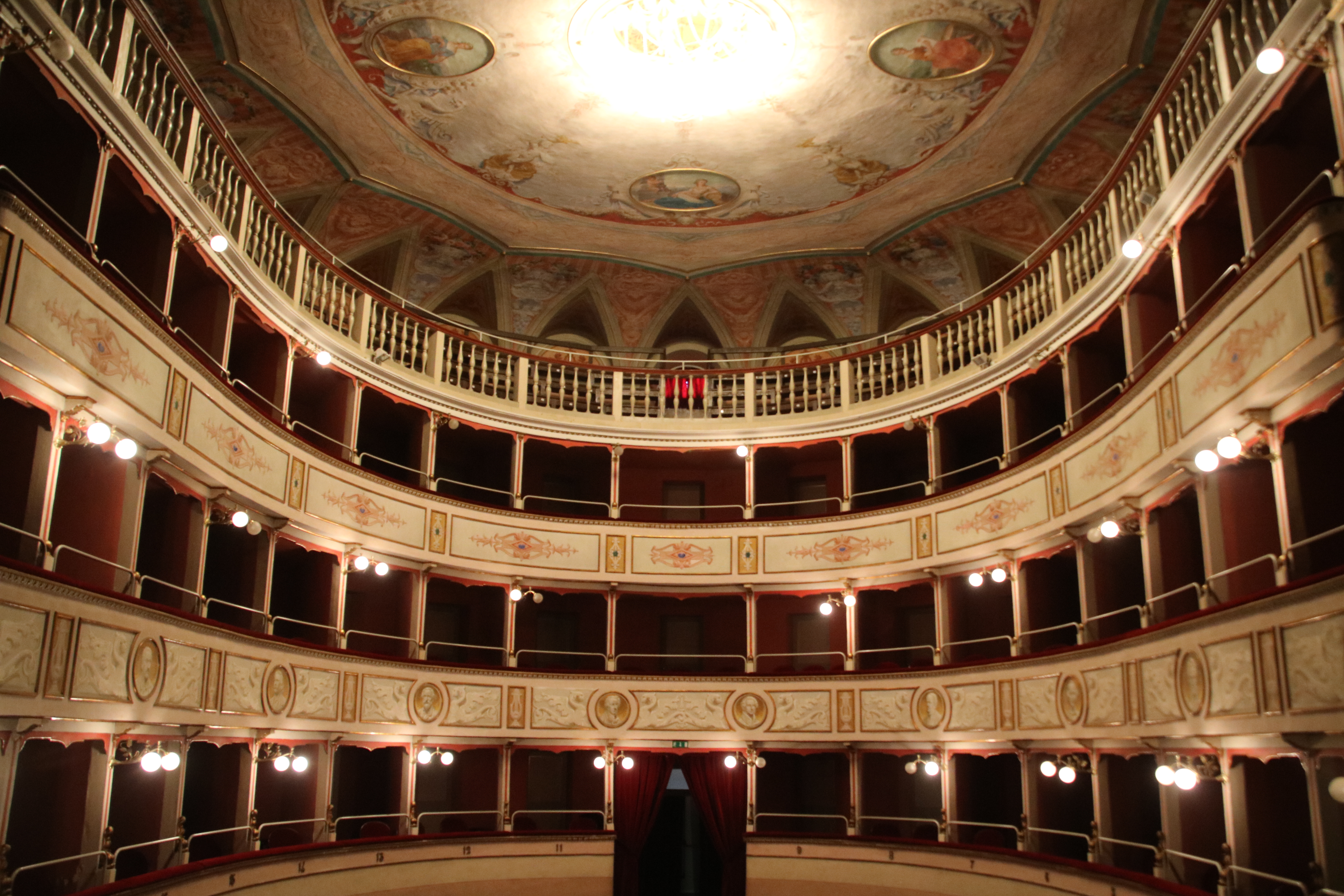 Matelica, Teatro Comunale G. Piermarini